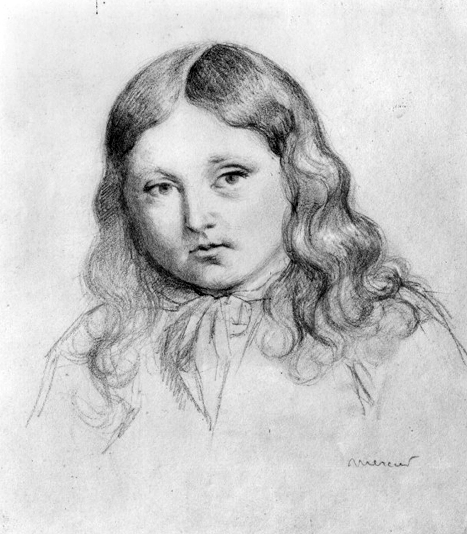 Solange Dudevant, fille de George Sand, dessin